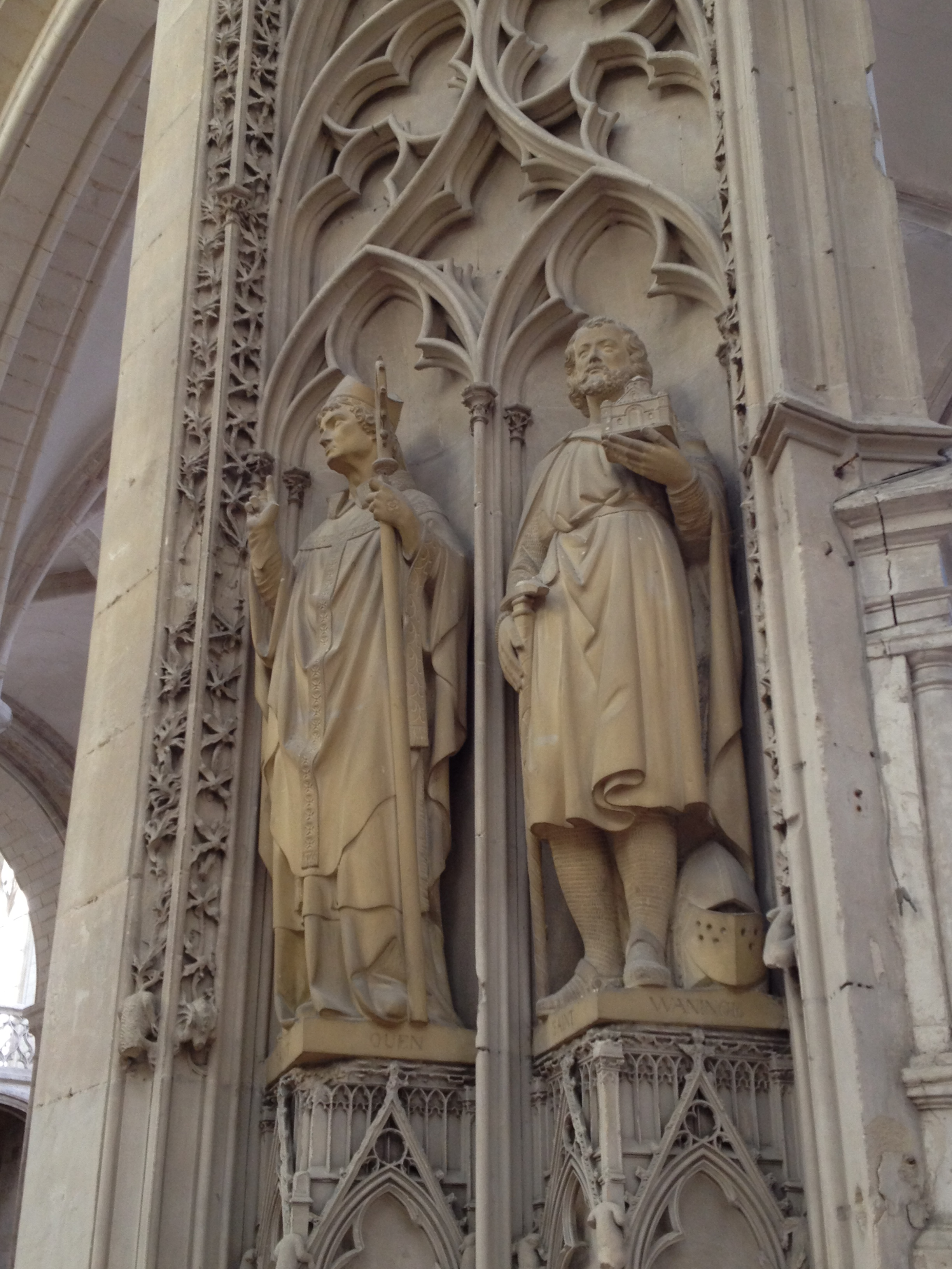 Statue de Saint-Ouen et Saint-Waninge, sur le côté sud du choeur.